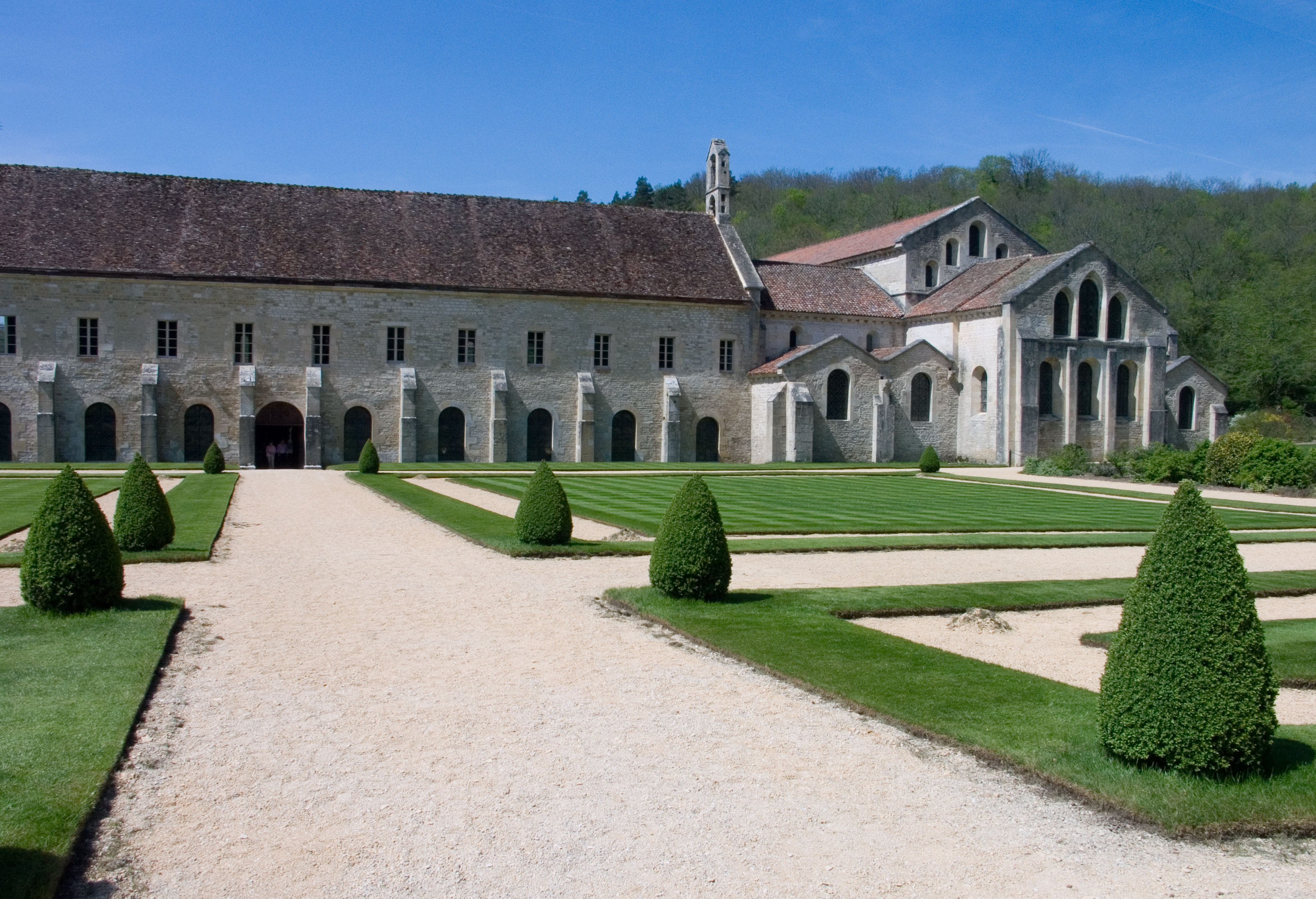 Abbaye de Fontenay - Chevet de l'église et façade orientale du dortoir et de la salle capitulaire.